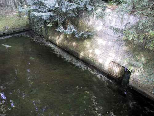 photo personnelle domaine public